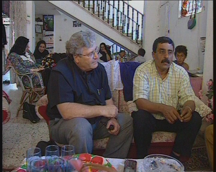 צוואת הבן